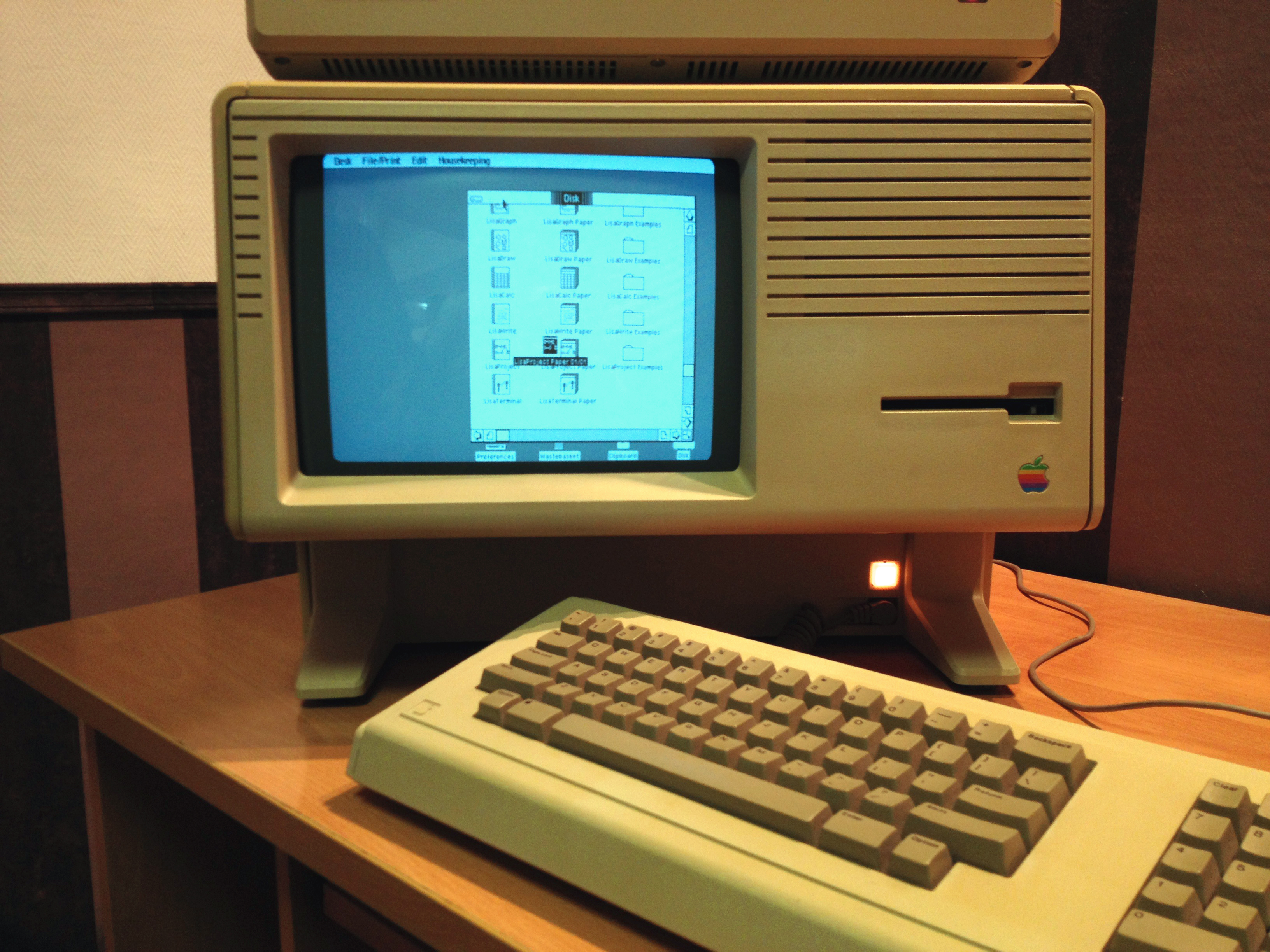 Viejos equipos Apple en el Little Apple Museum